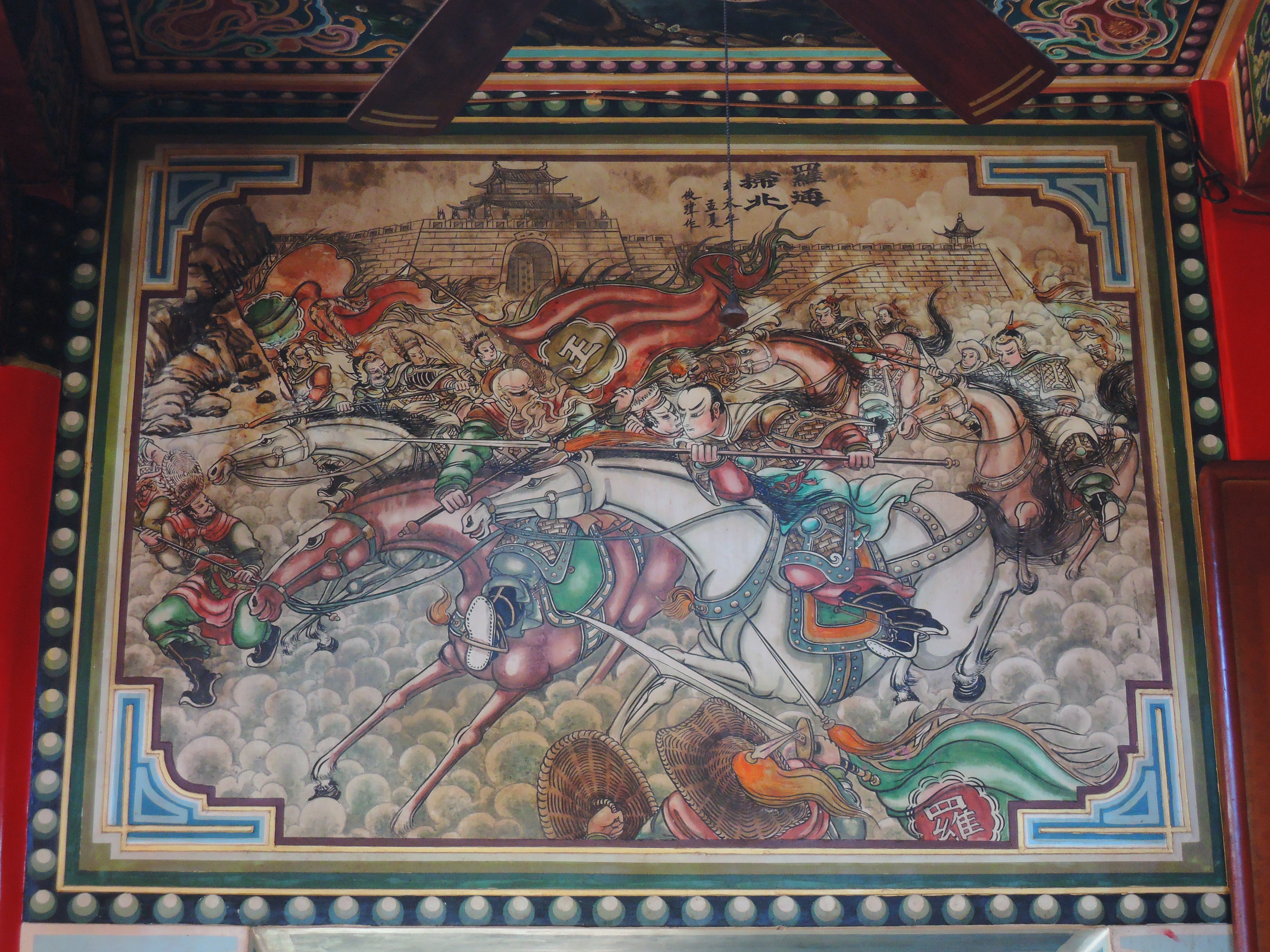 菜園東安宮，主祀朱府王爺。